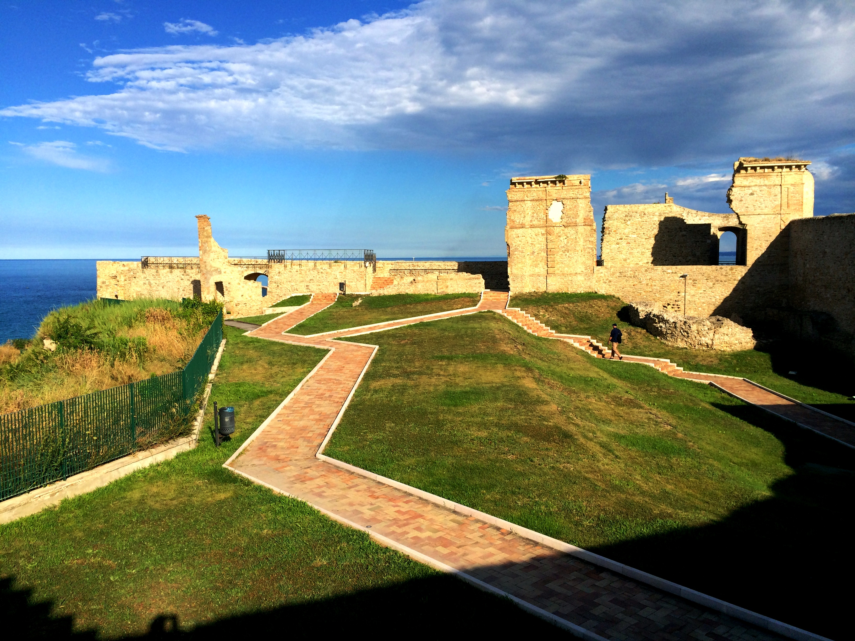 Interno del Castello Aragonese di Ortona, Chieti.